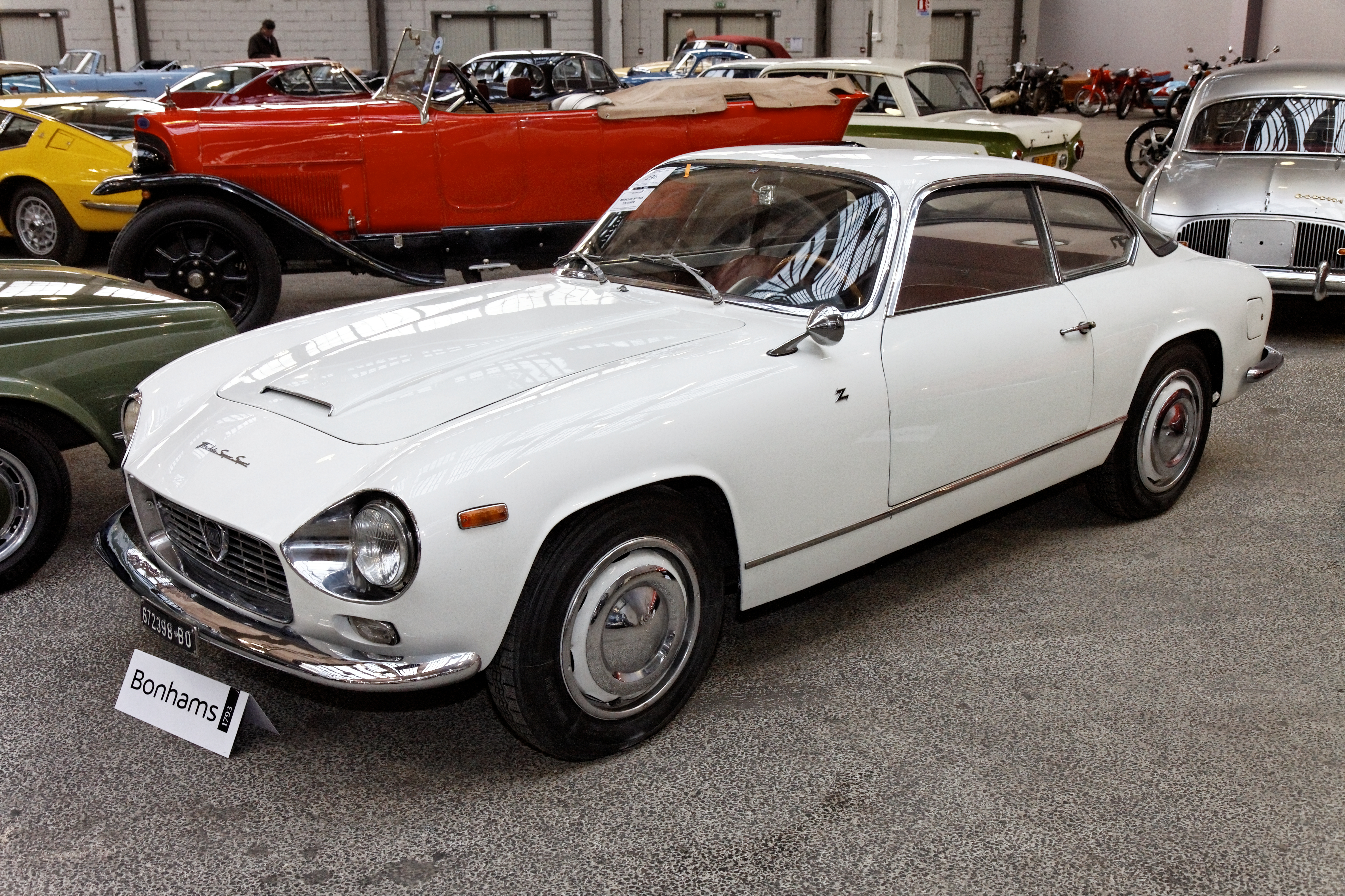 Lancia Flaminia Super Sport 'Double Bubble' Coupé